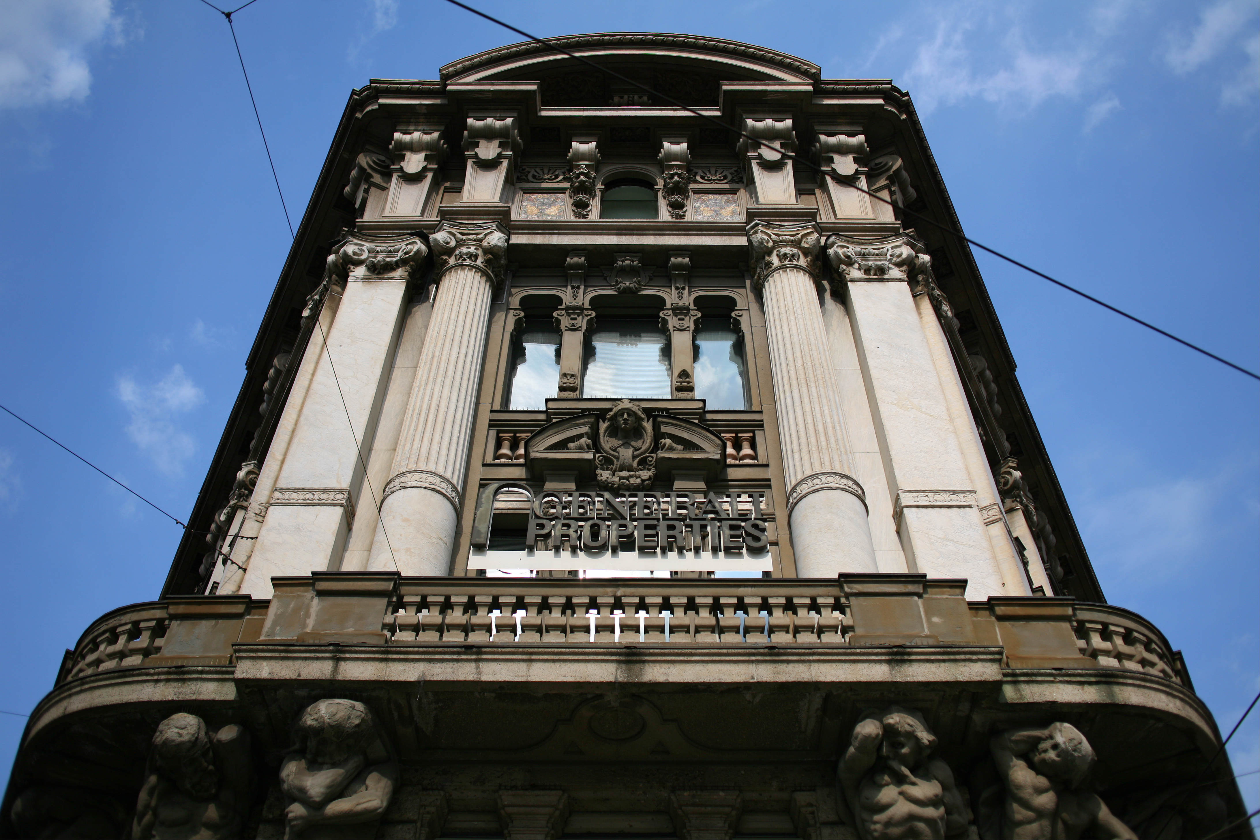 Casa Broggi, veduta prospettica della facciata